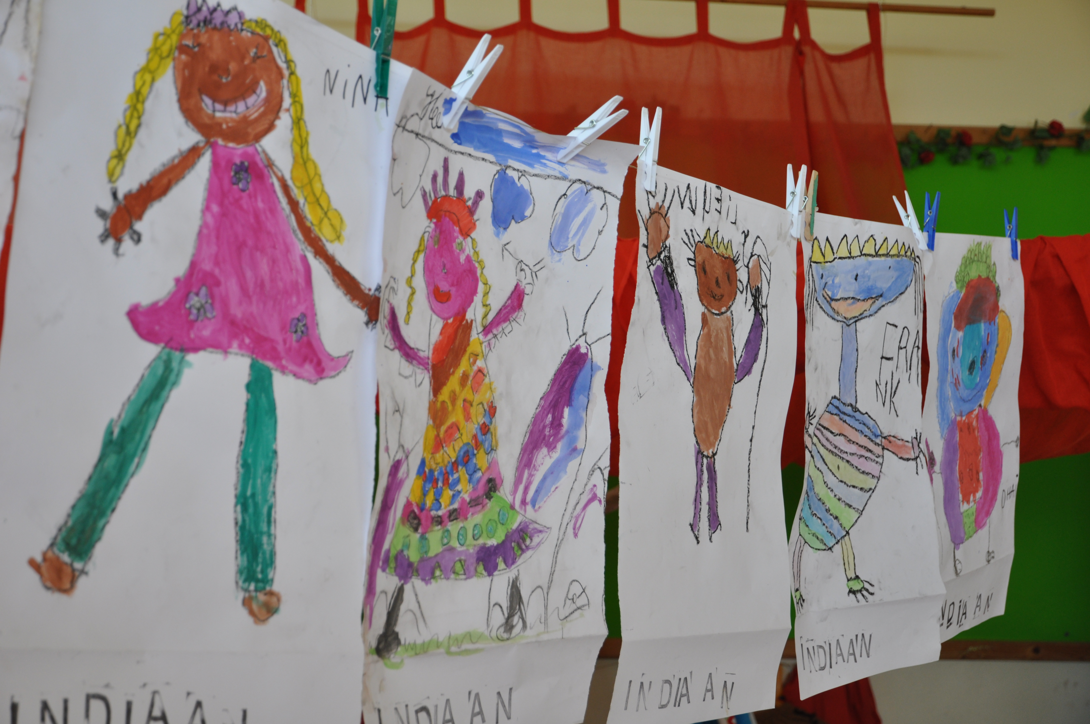 Kindertekeningen aan een waslijn op de Werkplaats Kindergemeenschap in Bilthoven.